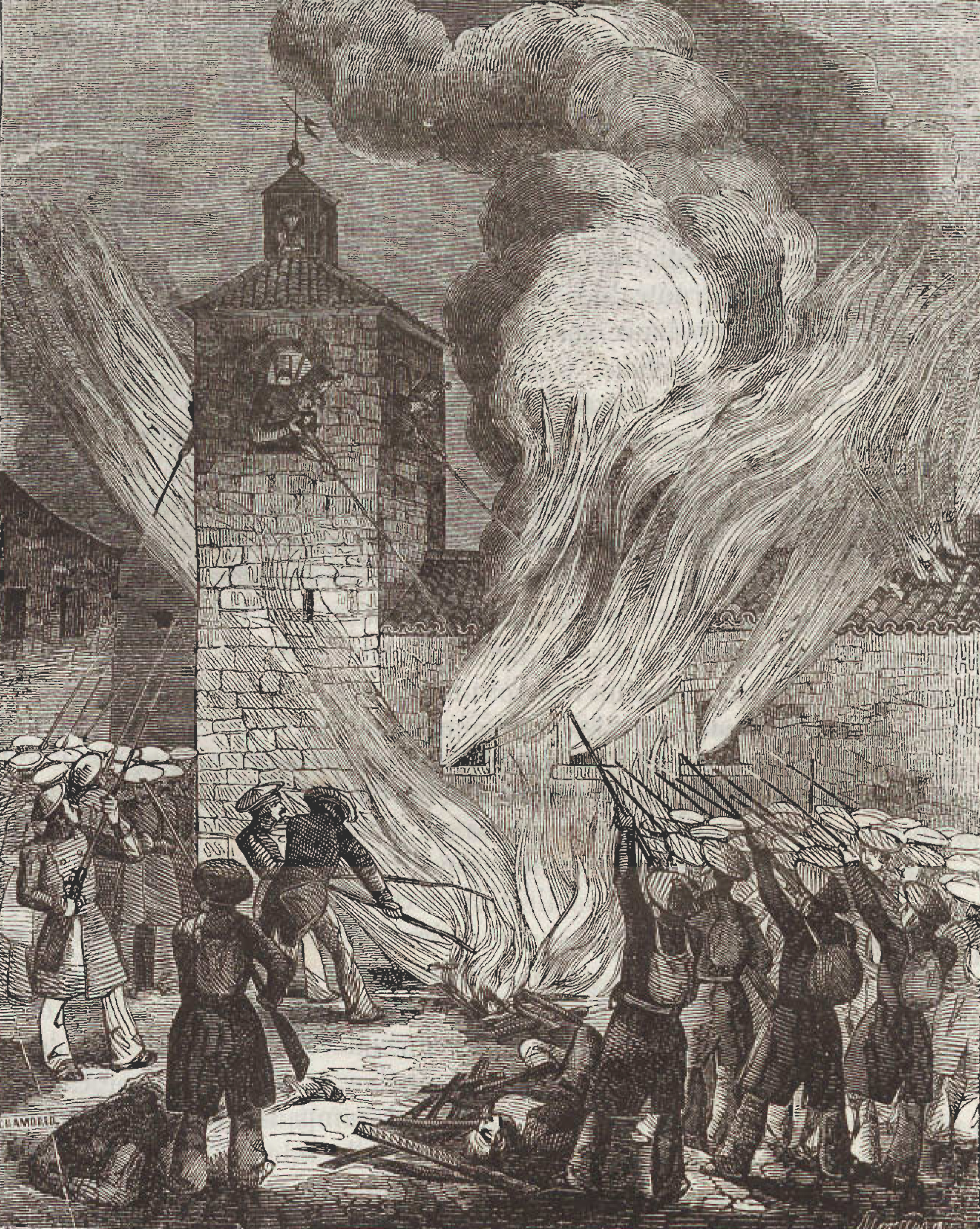 Defensa heroica de Albocácer por veinte y ocho soldados de la reina y varios urbanos de dicho pueblo.